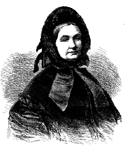 Emilia Flygare-Carlén